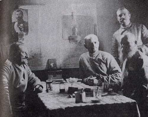 В штабной землянке. В центре (под лампой) — войсковой старшина Пётр Степанович Абашкин.